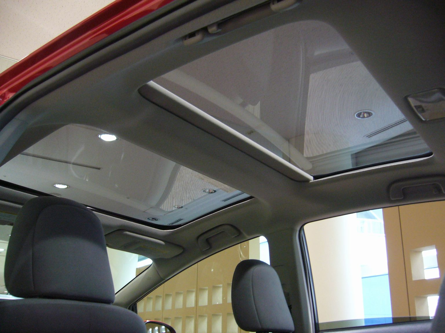 トヨタ・プリウスα